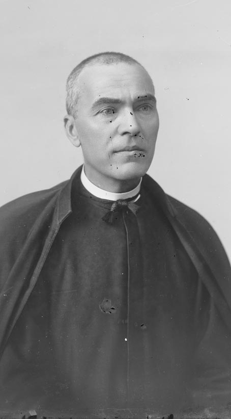 Retrat de front i mig cos del poeta Jacint Verdaguer i Santaló (Mossèn Cinto Verdaguer).